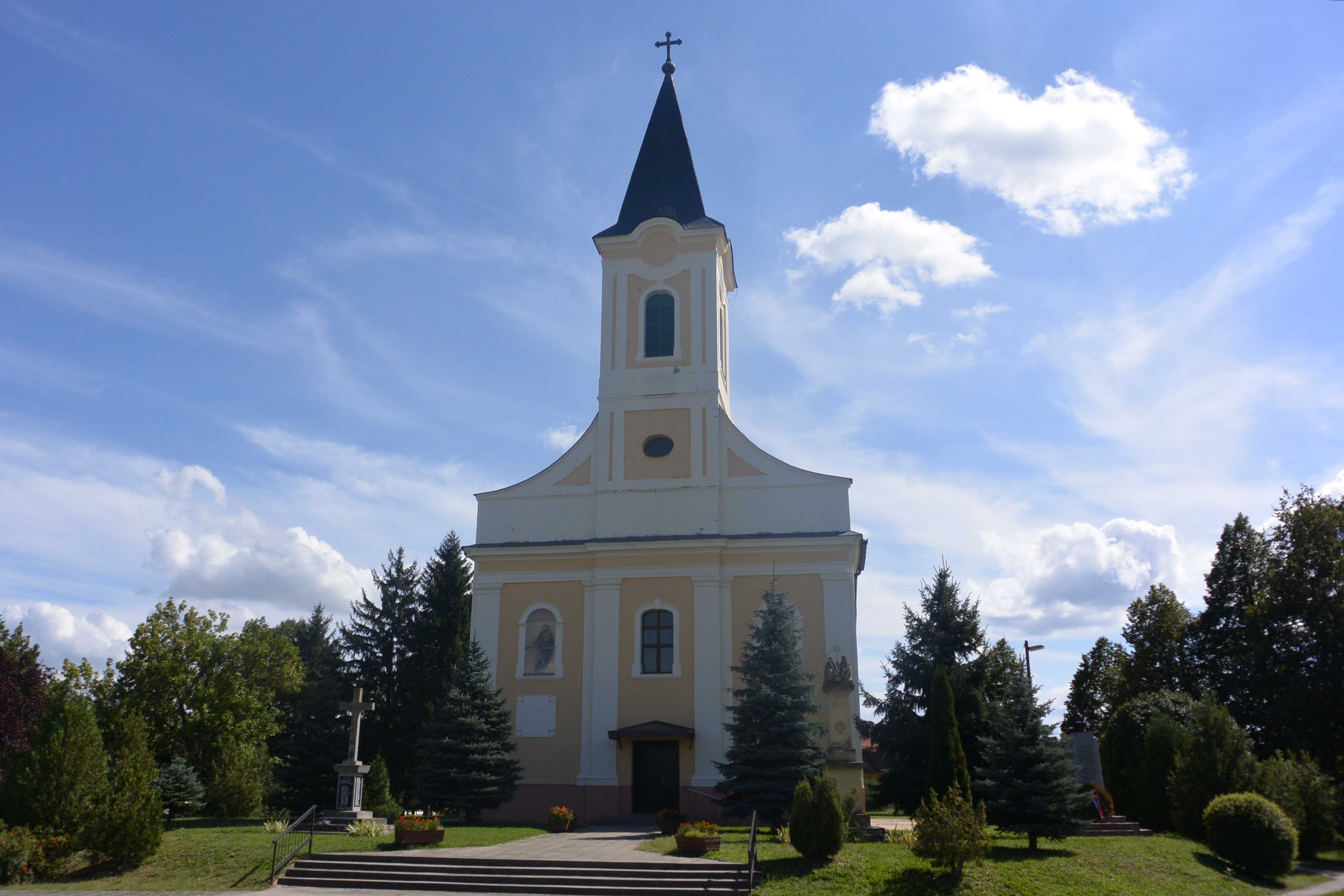 Szent Imre-templom, Nagybaracska